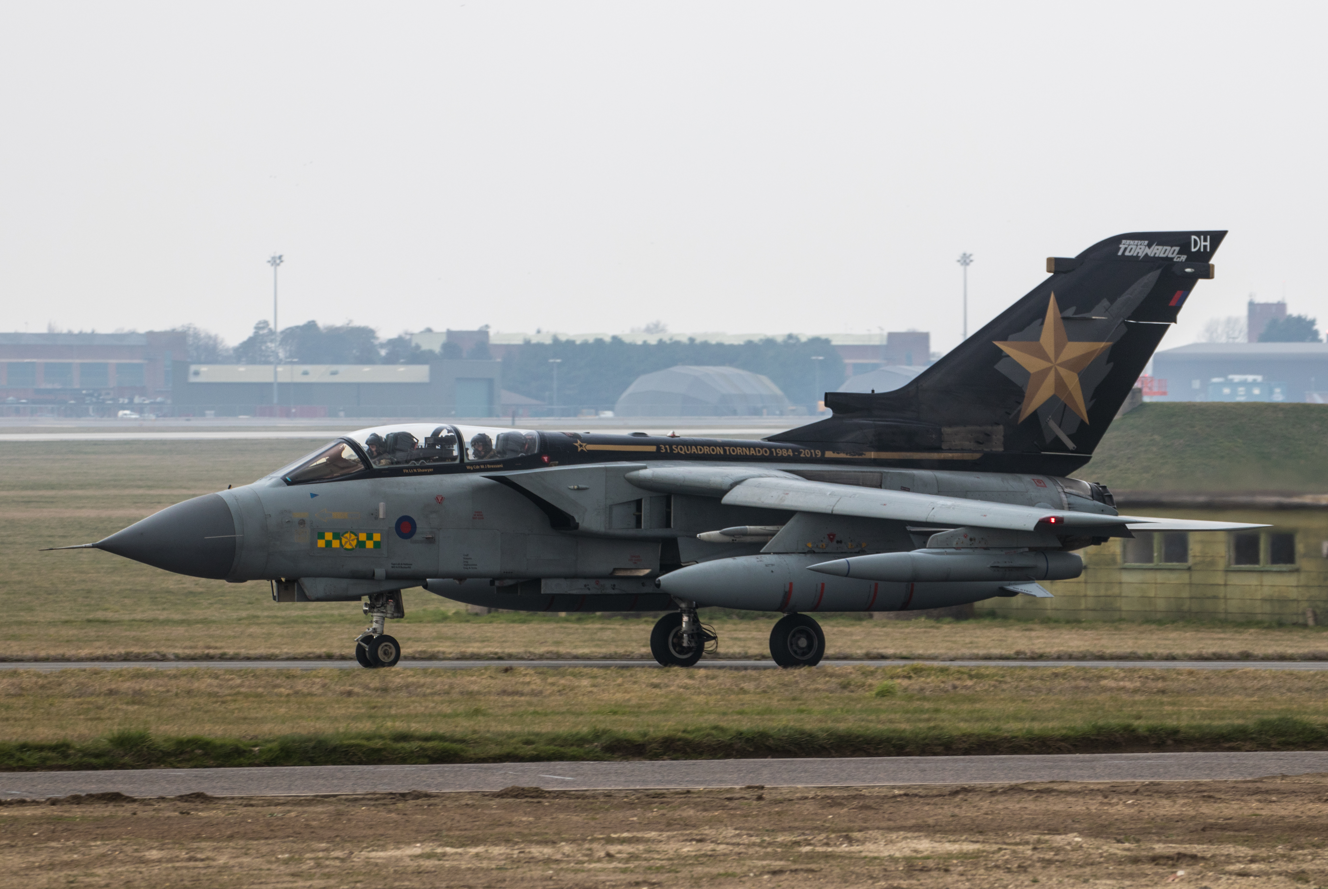 RAF Marham, Norfolk